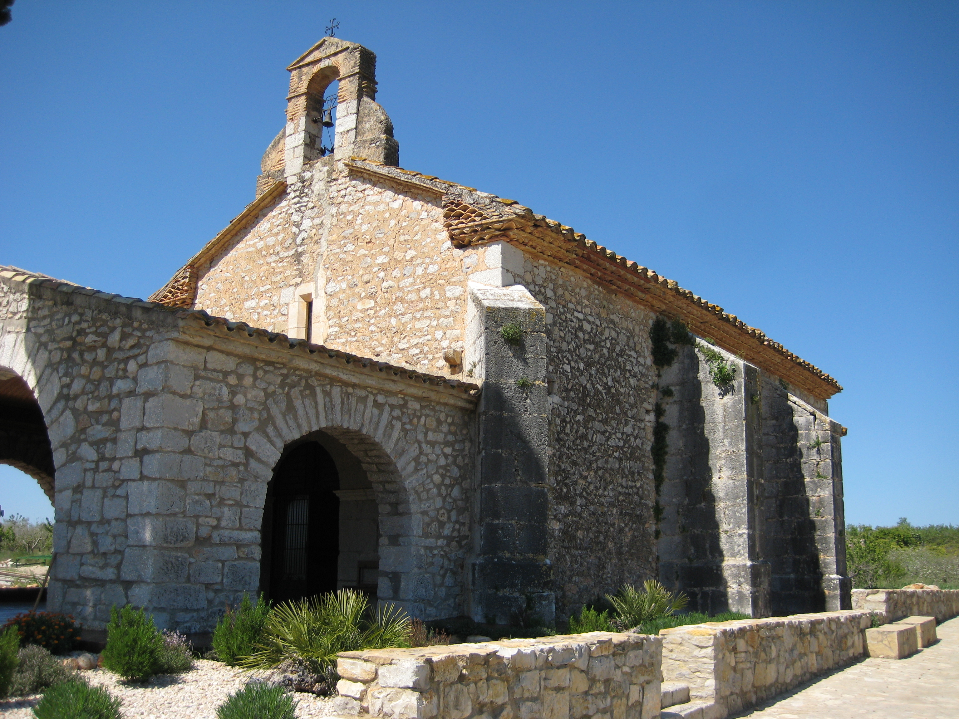 Ermita de Santa Bàrbara de la Salzadella (Baix Maestrat)